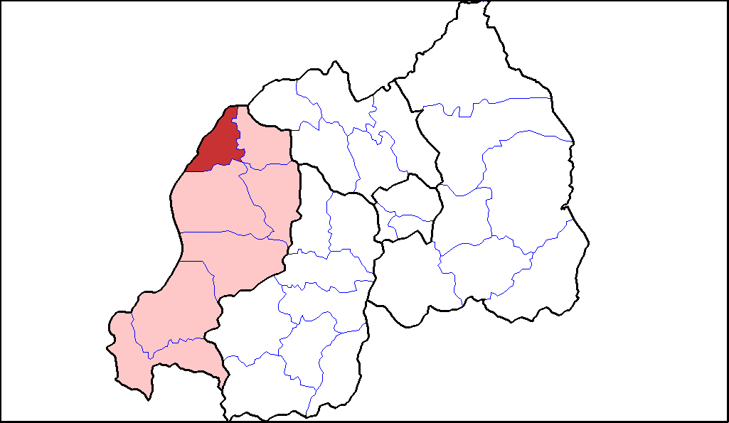 Distretto di Rubavu.